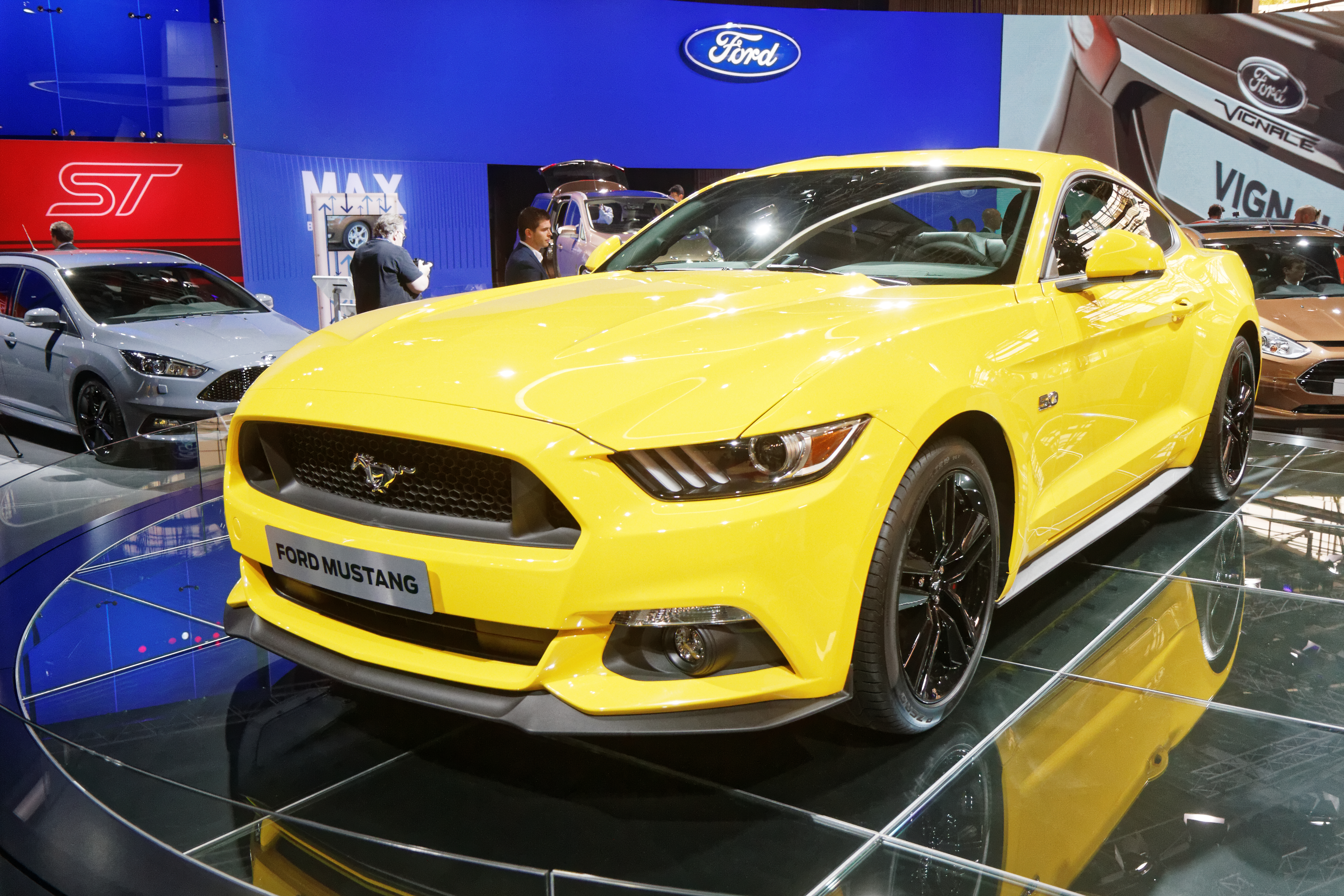 Une Ford Mustang présentée lors du mondial de l'automobile de Paris 2014.